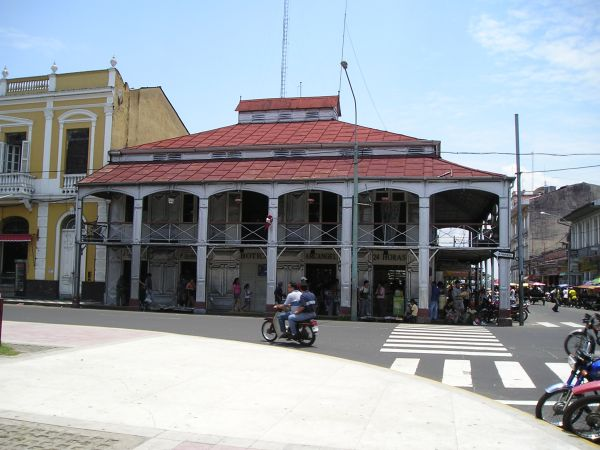 La Casa de Fierro entre la Putumayo y la Prospero